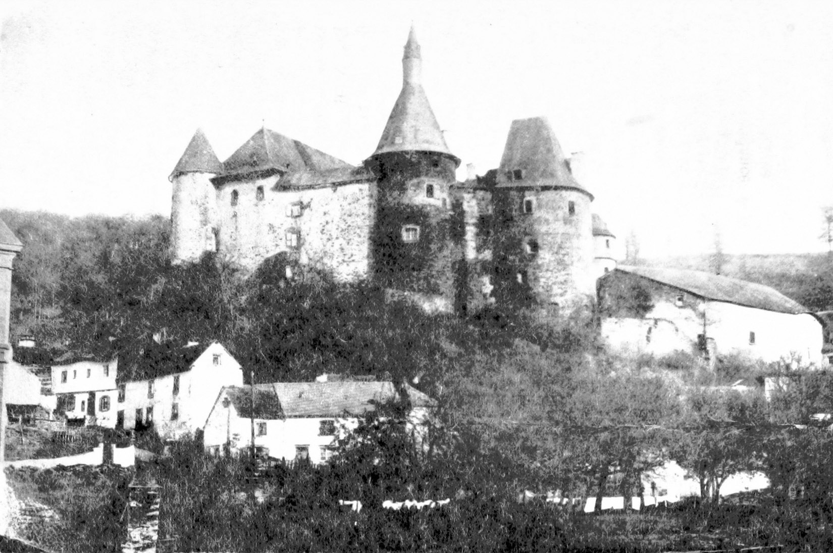 Ansicht des Schlosses Clerf von Westen